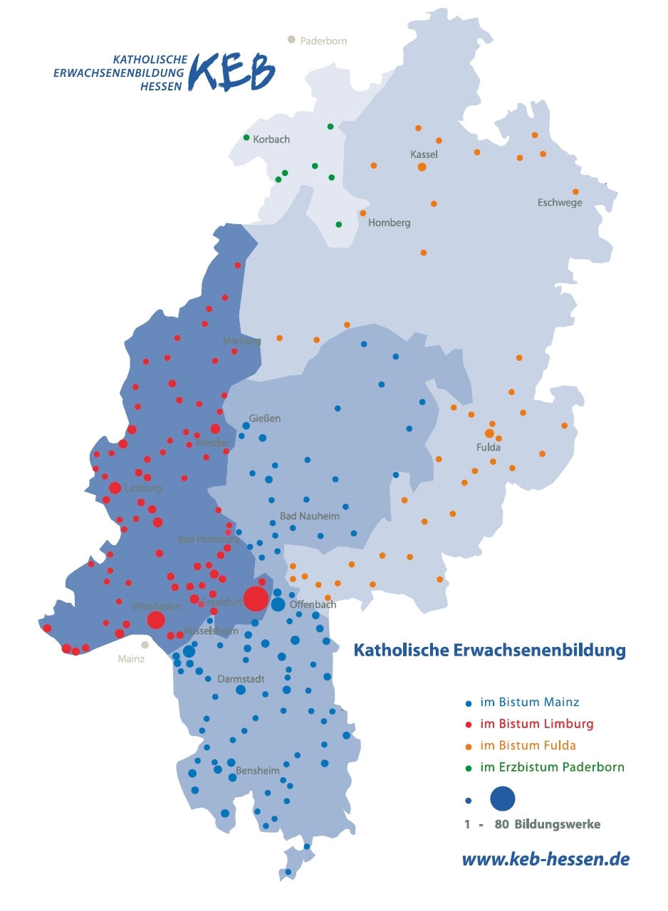 Karte der Katholischen Erwachsenenbildung Hessen – Landesarbeitsgemeinschaft e. V. und der Verteilung ihrer landesweiten Veranstaltungen